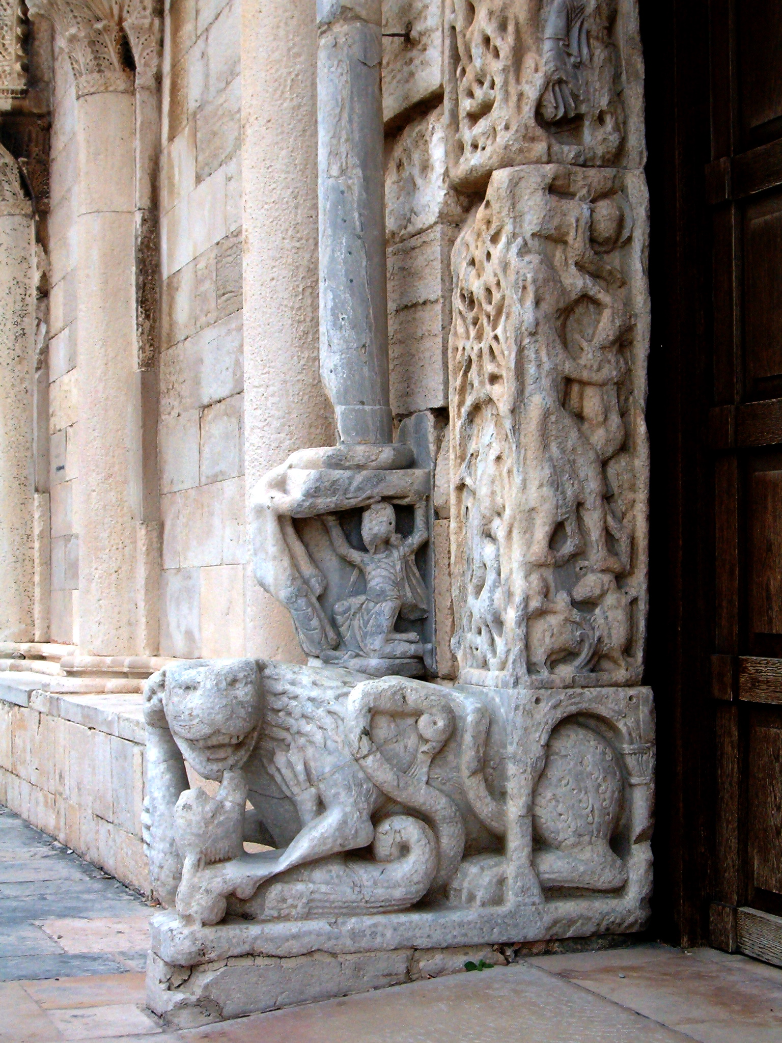 Cattedrale di Trani (Puglia, Italy), 1099 - 1143. Leone stiloforo di sinistra.